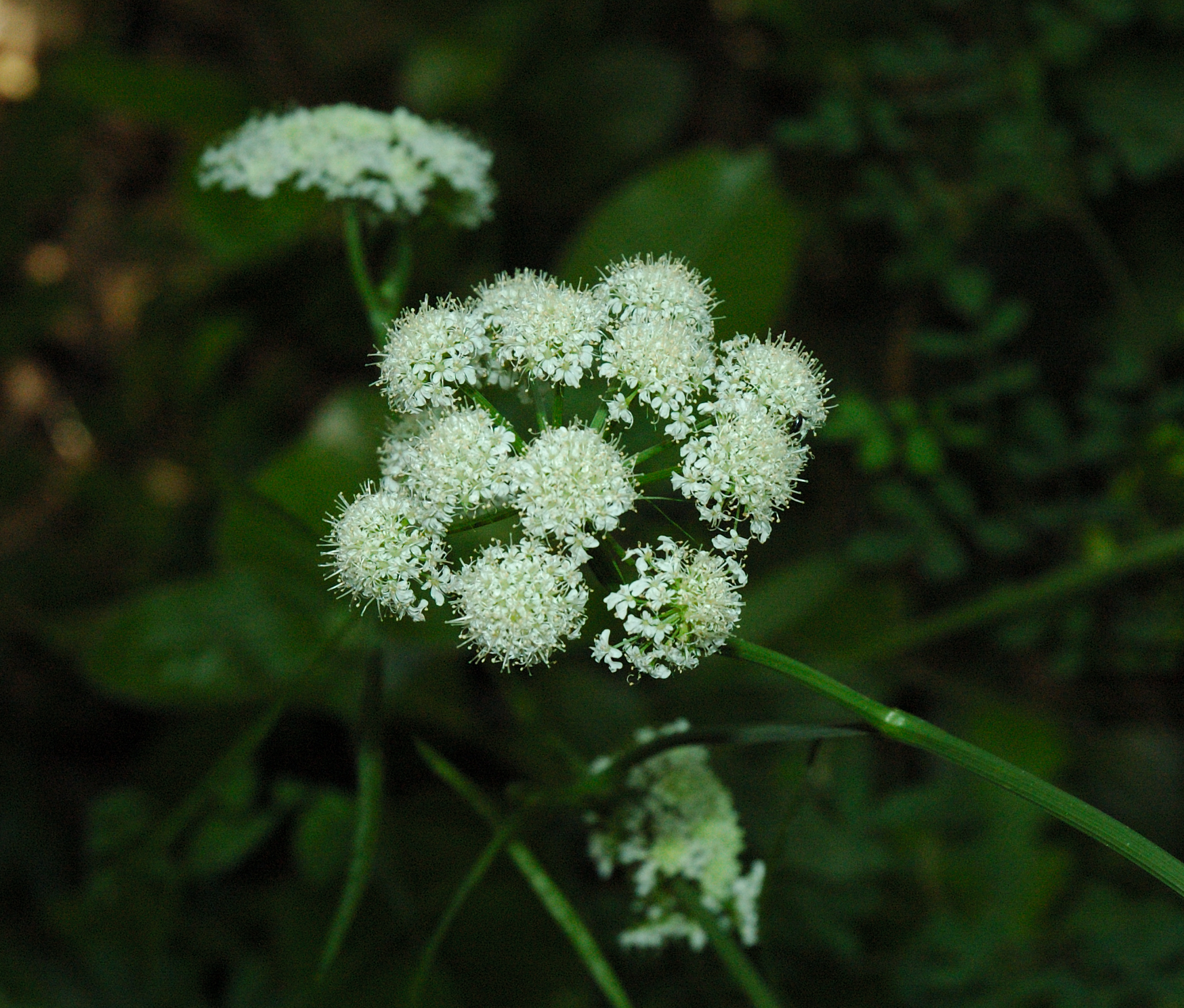 Bunium bulbocastanum (Original: 156565744_e8a9126d3c_o.jpg)